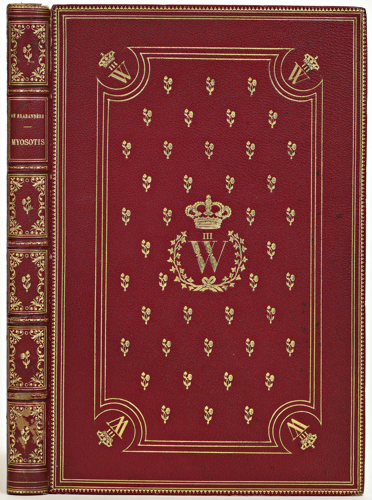 Inhoud: (Le chevalier) de Brabandère. Myosotis, croquis de la vie Bruxelloise. Bruxelles, 1864